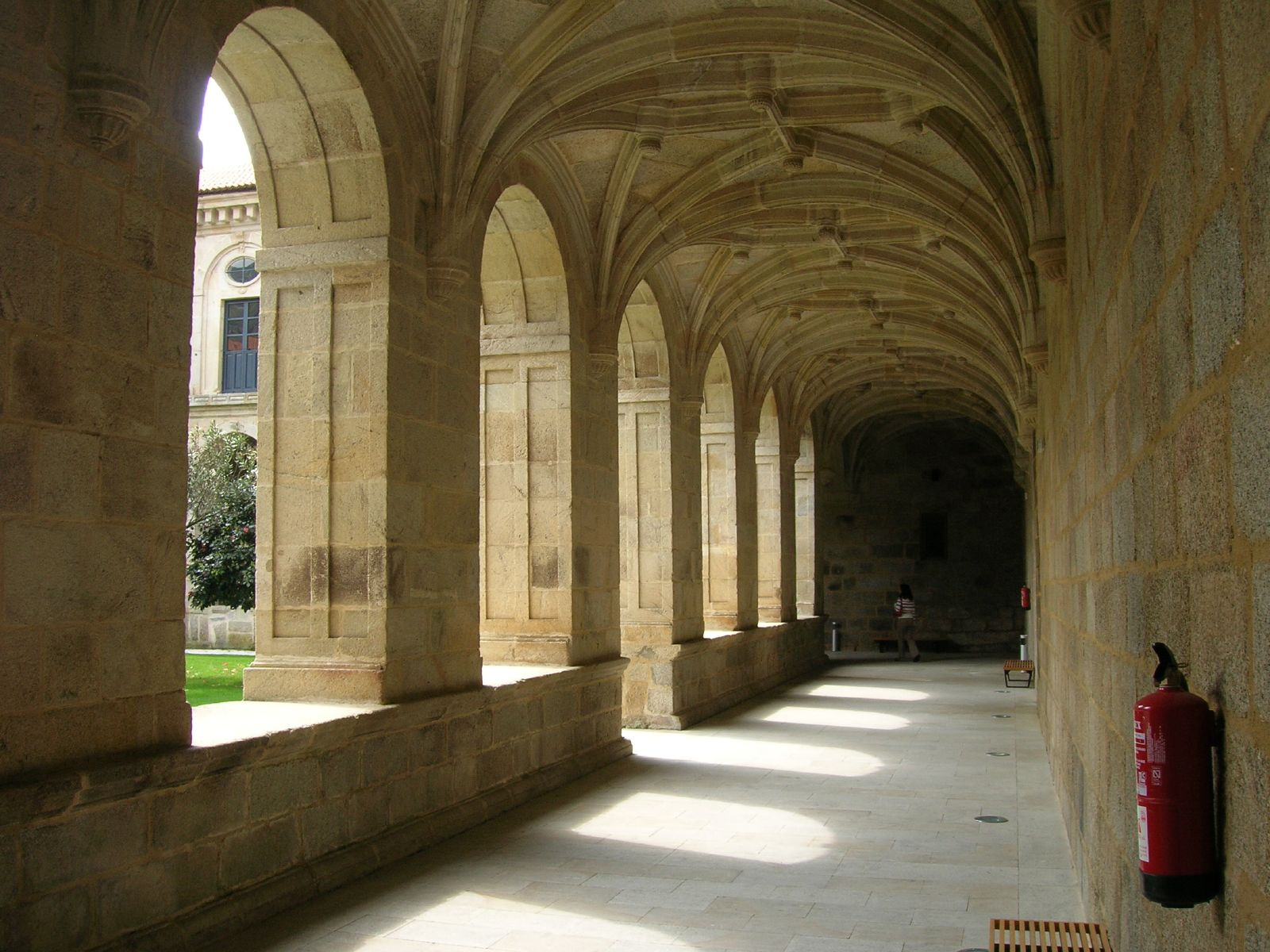 Mosteiro de San Clodio de Leiro, Leiro, Galicia - Spain